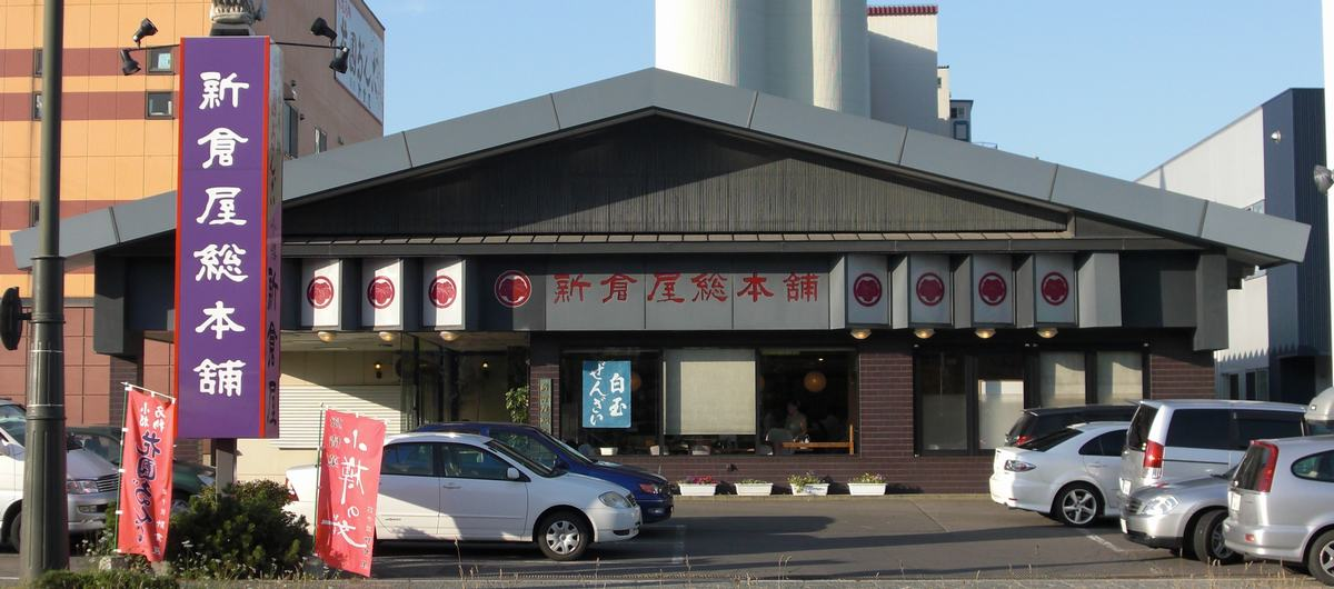 Niikuraya (wagashi shop, Otaru-shi, Japan) )